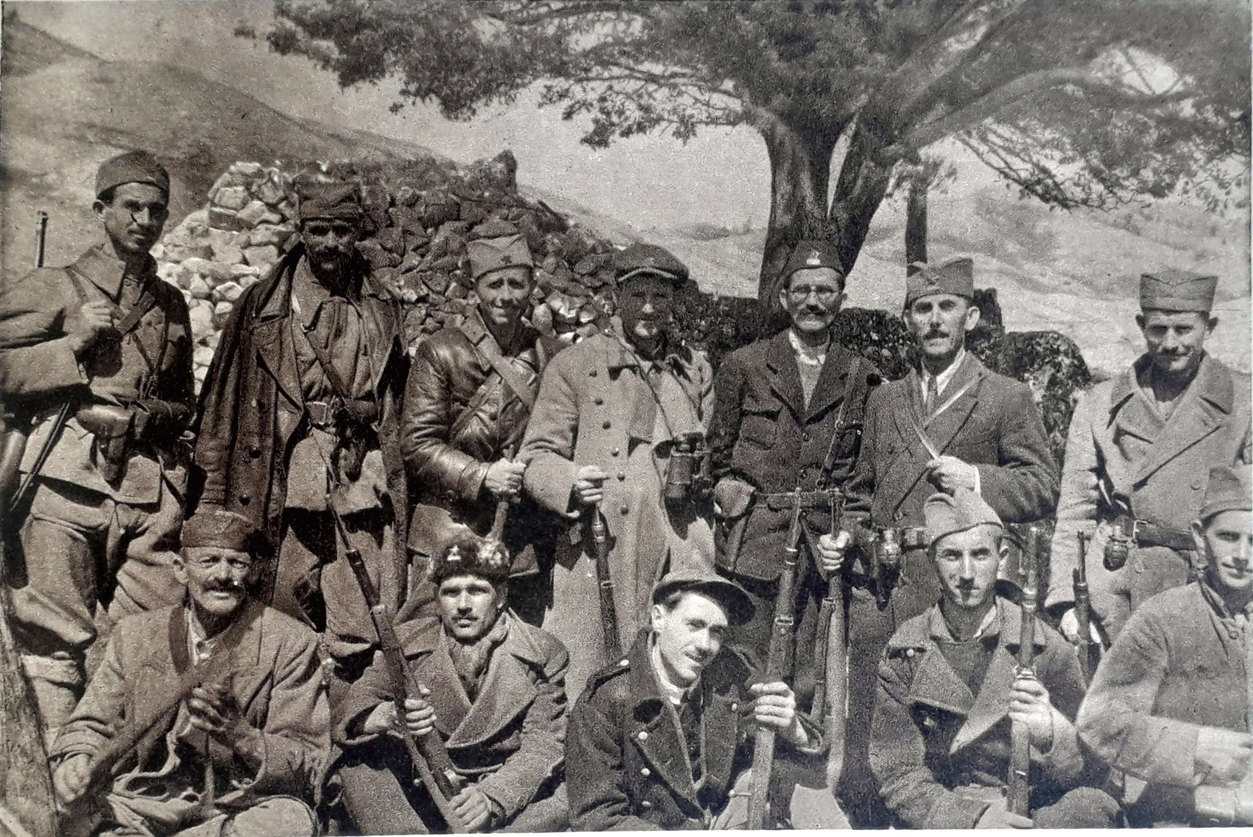 Srpskohrvatski / српскохрватски: Partizanski ustanici u Crnoj Gori 1941. godine.